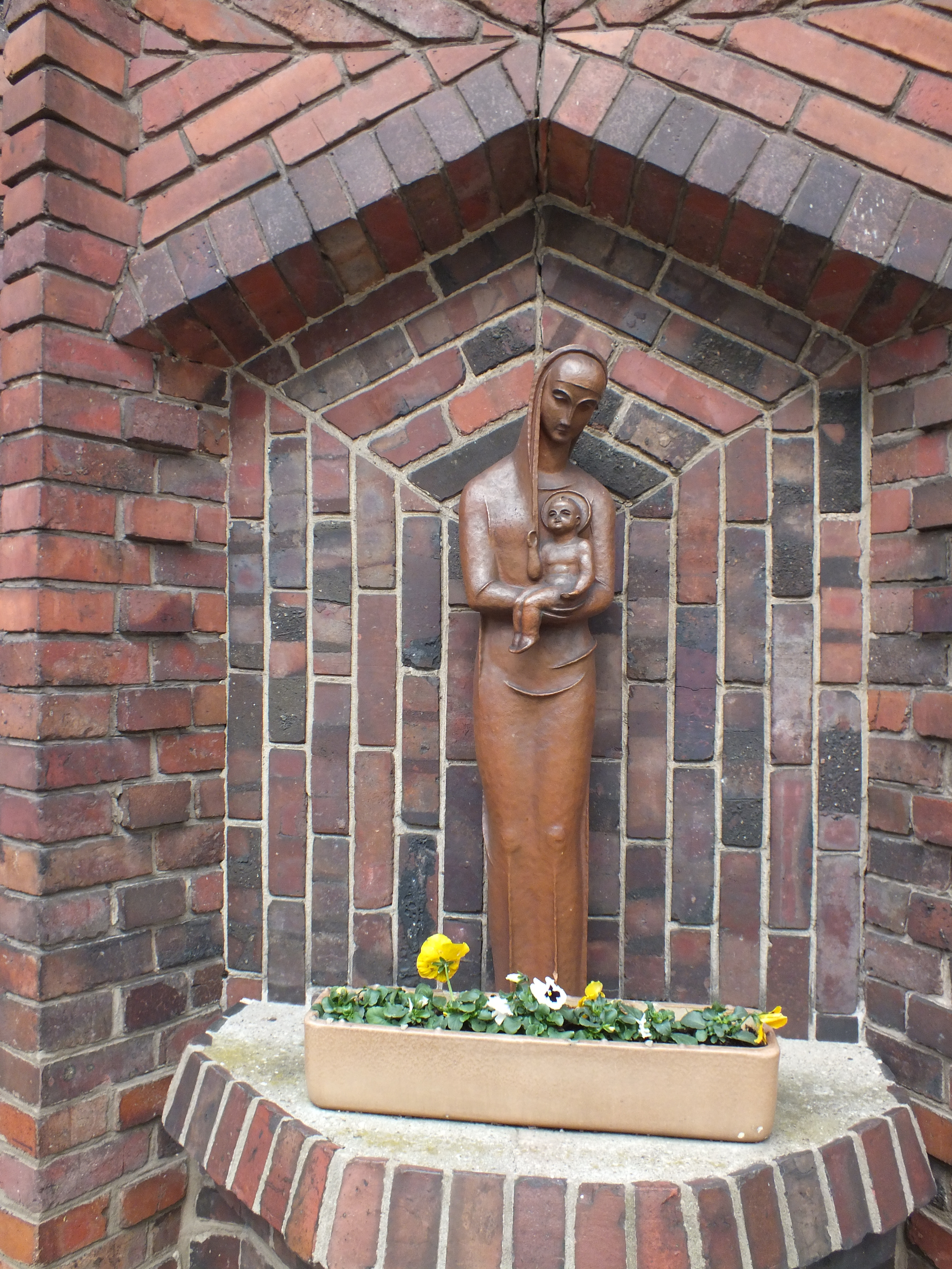 kathol. Kirche Maria Magdalena, Niederschönhausen: Marienfigur, eh. auf dem Taufstein, nun neben dem Hauptportal auf dem früheren Brunnen